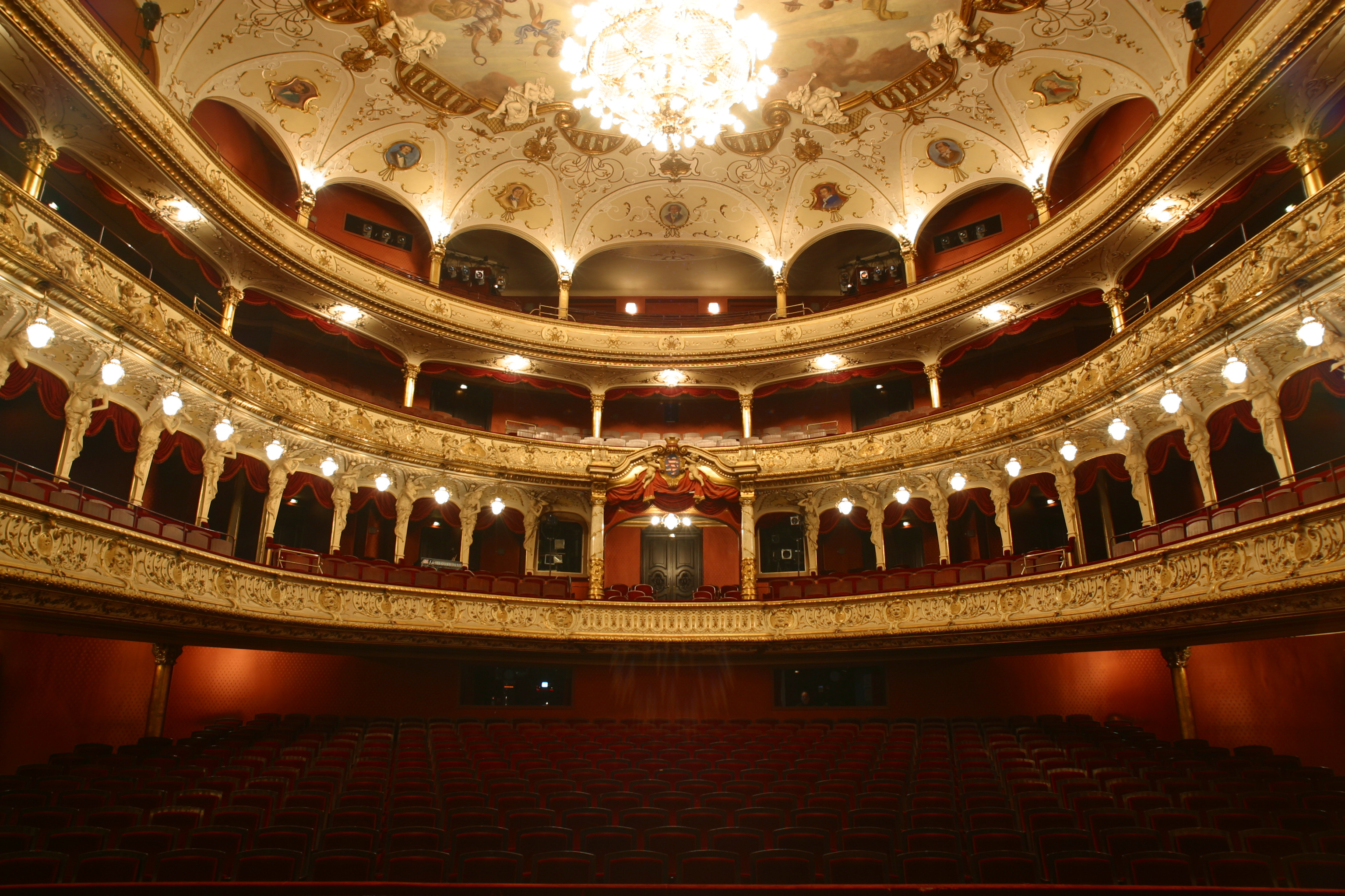 Hessisches Staatstheater Wiesbaden